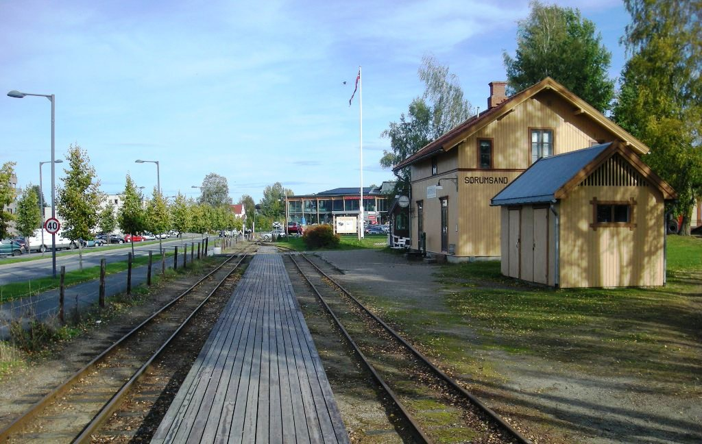 Den rekonstruerte Sørumsand stasjon ved museumsjernbanen Tertitten